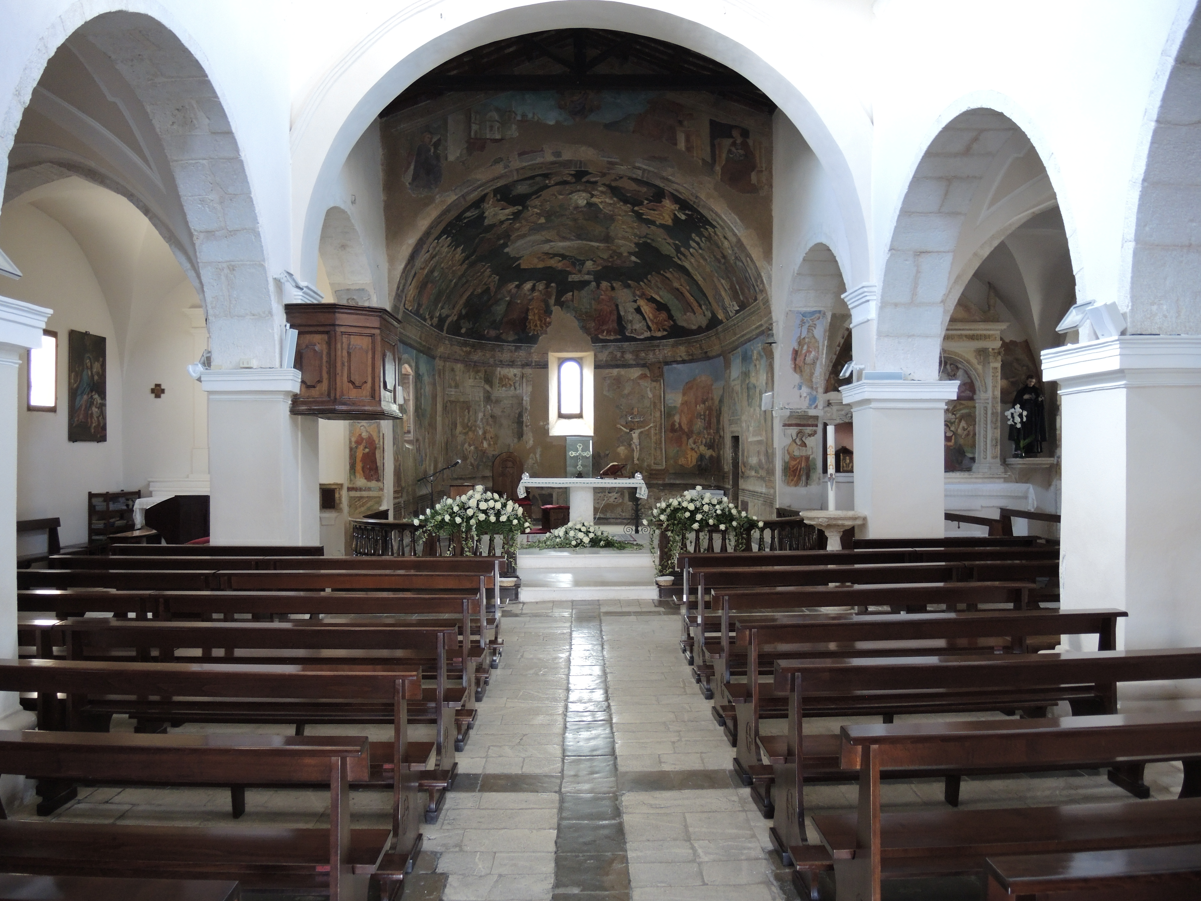 Tornimparte: Chiesa di San Panfilo